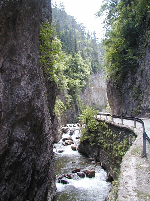 Trigrad Gorge, Rhodopes, Bulgaria